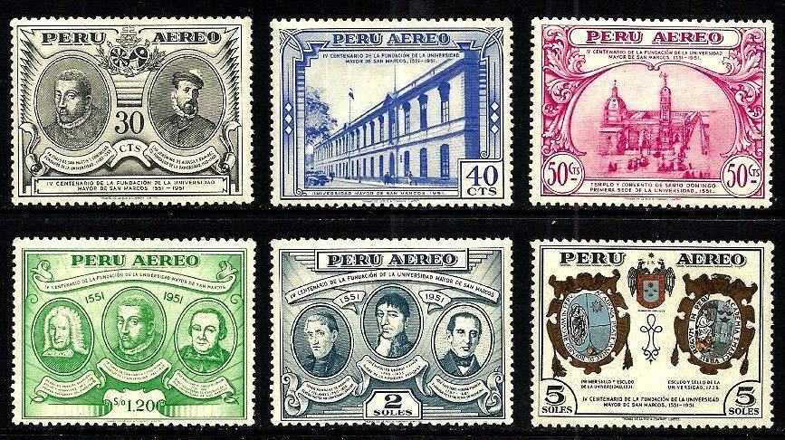 Estampillas conmemorativas Para 1951, es decir el IV Centenario de la Universidad Nacional Mayor de San Marcos, se produjeron una serie de estampillas conmemorativas alusivas a tan importante fecha, tanto para la historia de la universidad en el continente y nuestro país.